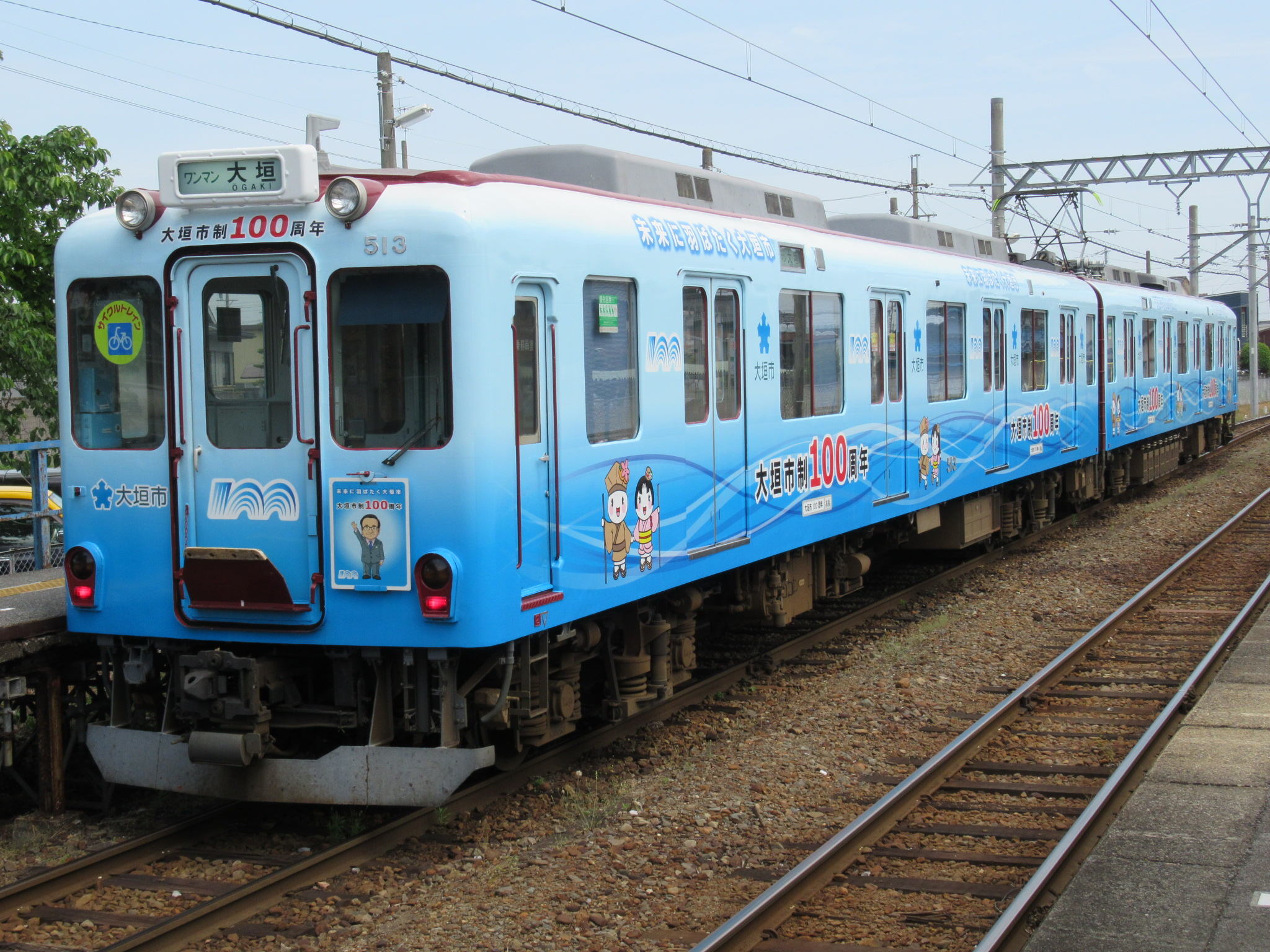 養老鉄道513 池野駅